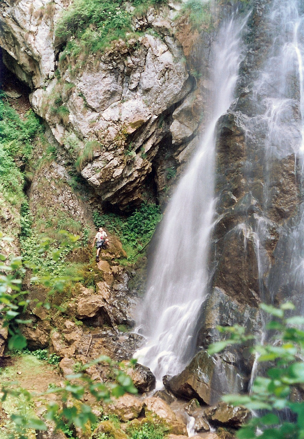 A Poeni patak vízesése a szolcsvai Búvópatak barlangjának közelében, Erdély